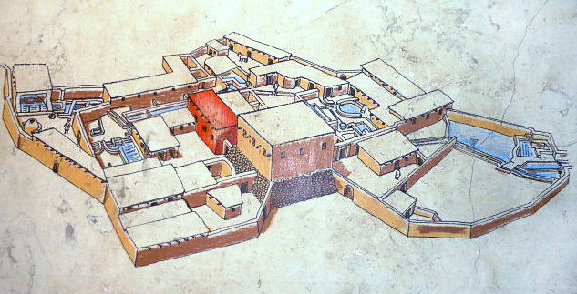 Qumran, Dead Sea, Israel Qumran Caves where the Dead Sea Scrolls קומראן